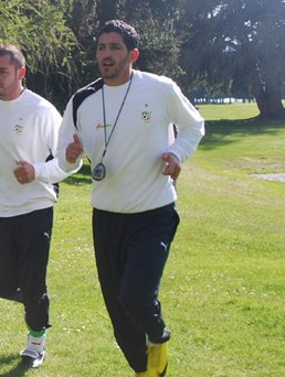 Rafik HALLICHE